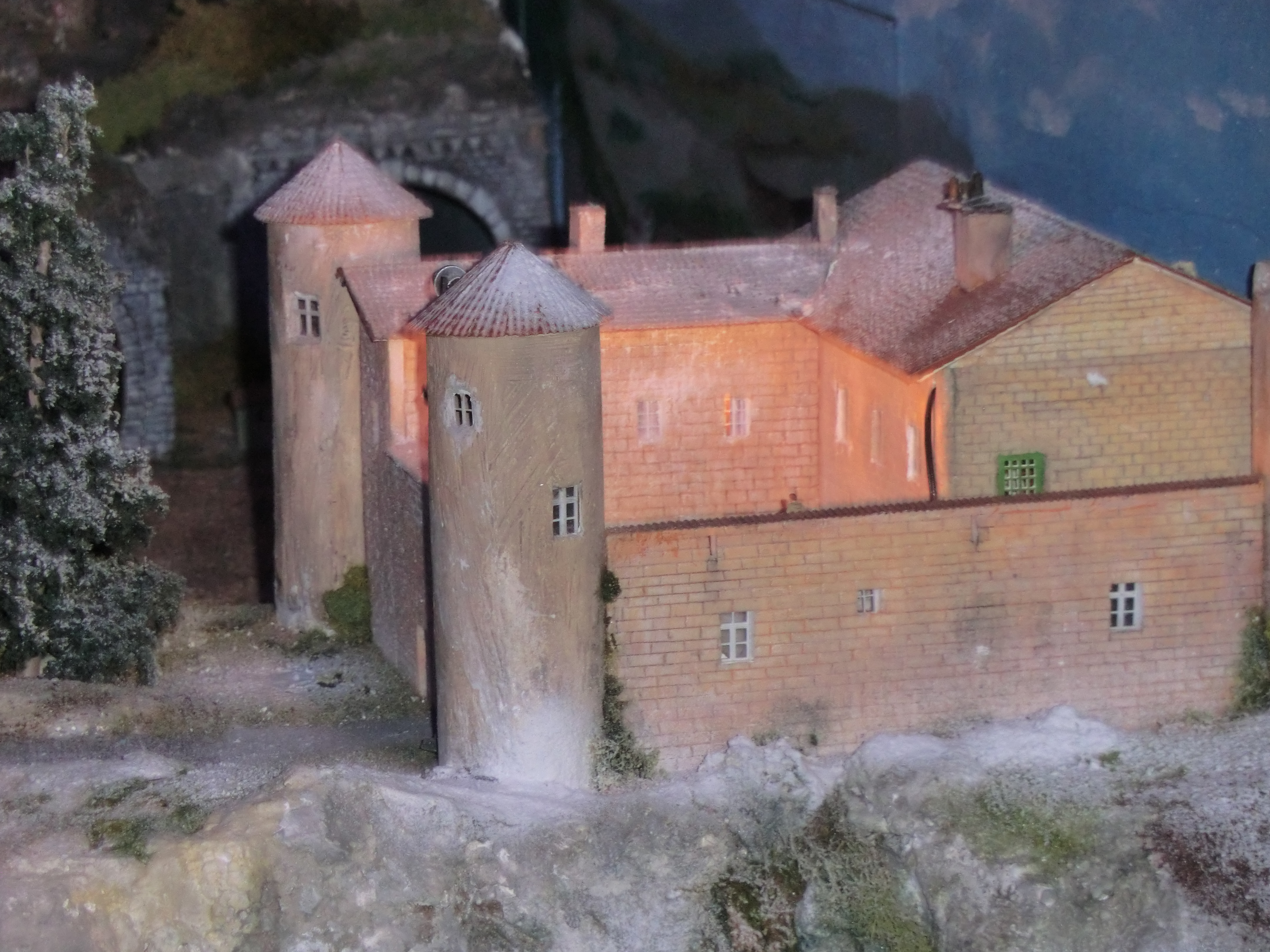 Reproduction du pensionnat du film Les Choristes (musée du train miniature de Châtillon-sur-Chalaronne).